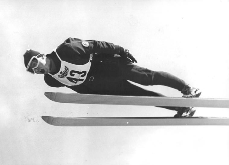 Zentralbild Thieme 3.3.1968 Oberhof: XX. DDR-Skimeisterschaften in den Nordischen Disziplinen DDR-Meister im Spezialsprunglauf von der großen Schanze wurde am 3.3.1968 auf der "Schanze am Rennsteig" Dieter Scharf (SC Traktor Oberwiesenthal). Der neue Meister sprang im ersten Durchgang 107 m weit, steigerte sich im zweiten Sprung (Foto) auf den neuen Schanzenrekord von 114,5 m und erreichte 254,9 Punkte.